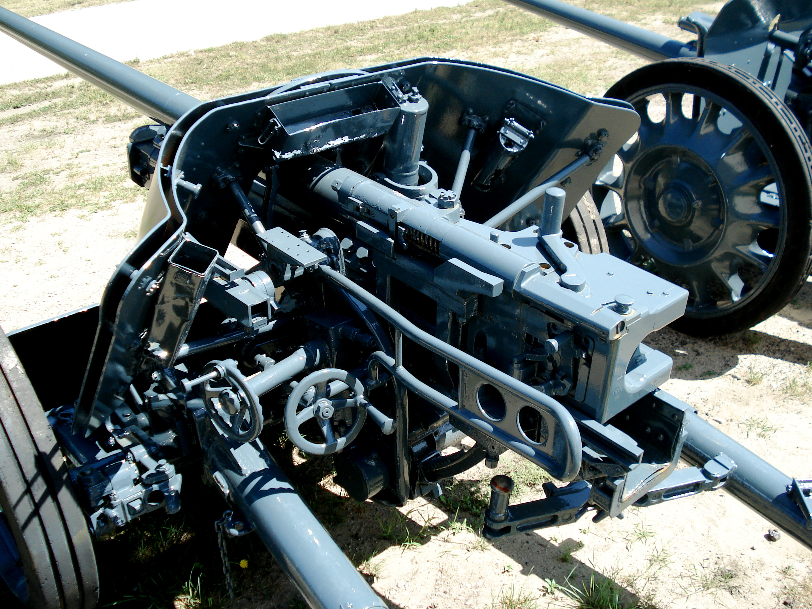 Pak 38 anti tank gun at CFB Borden